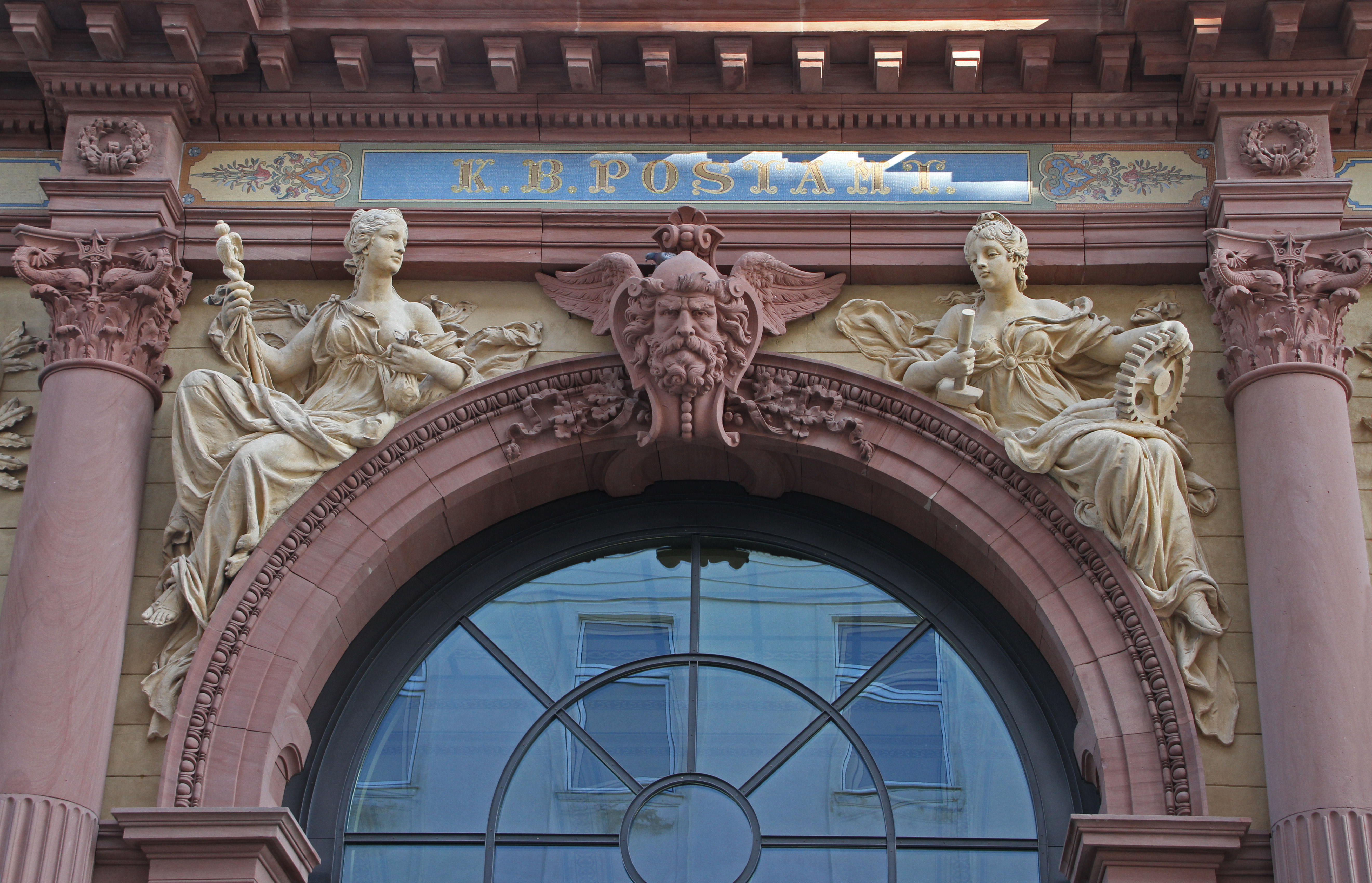 Ehemaliges Königlich-bayerisches Postamt; repräsentativer Neurenaissancebau, 1893. 2013 nach Umbau Nutzung als "Forum Alte Post".